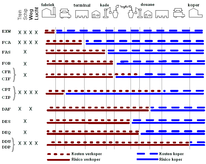 Incoterms zelf gemaakt gebruiker:Londenp